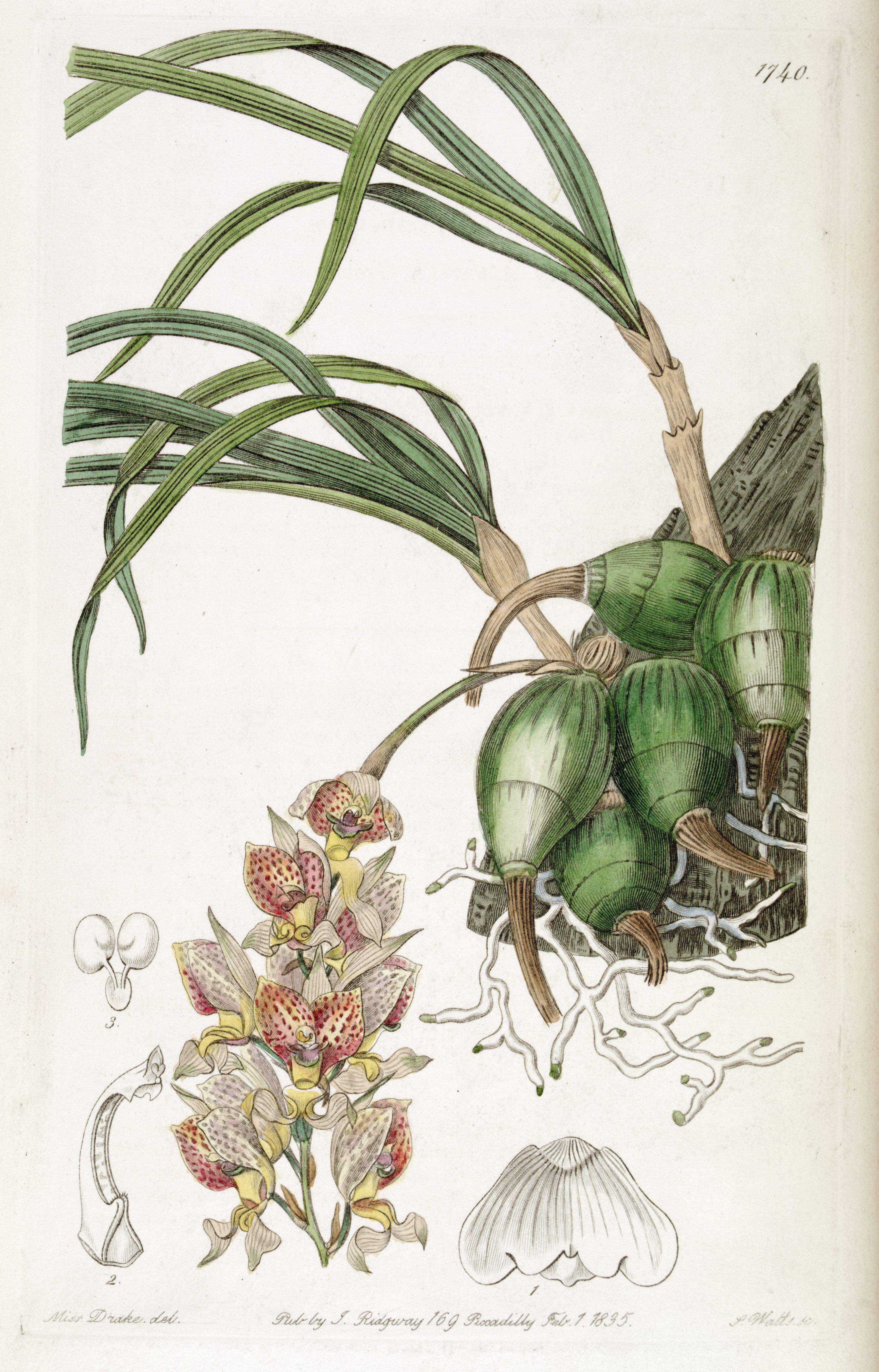 Grobya amherstiae